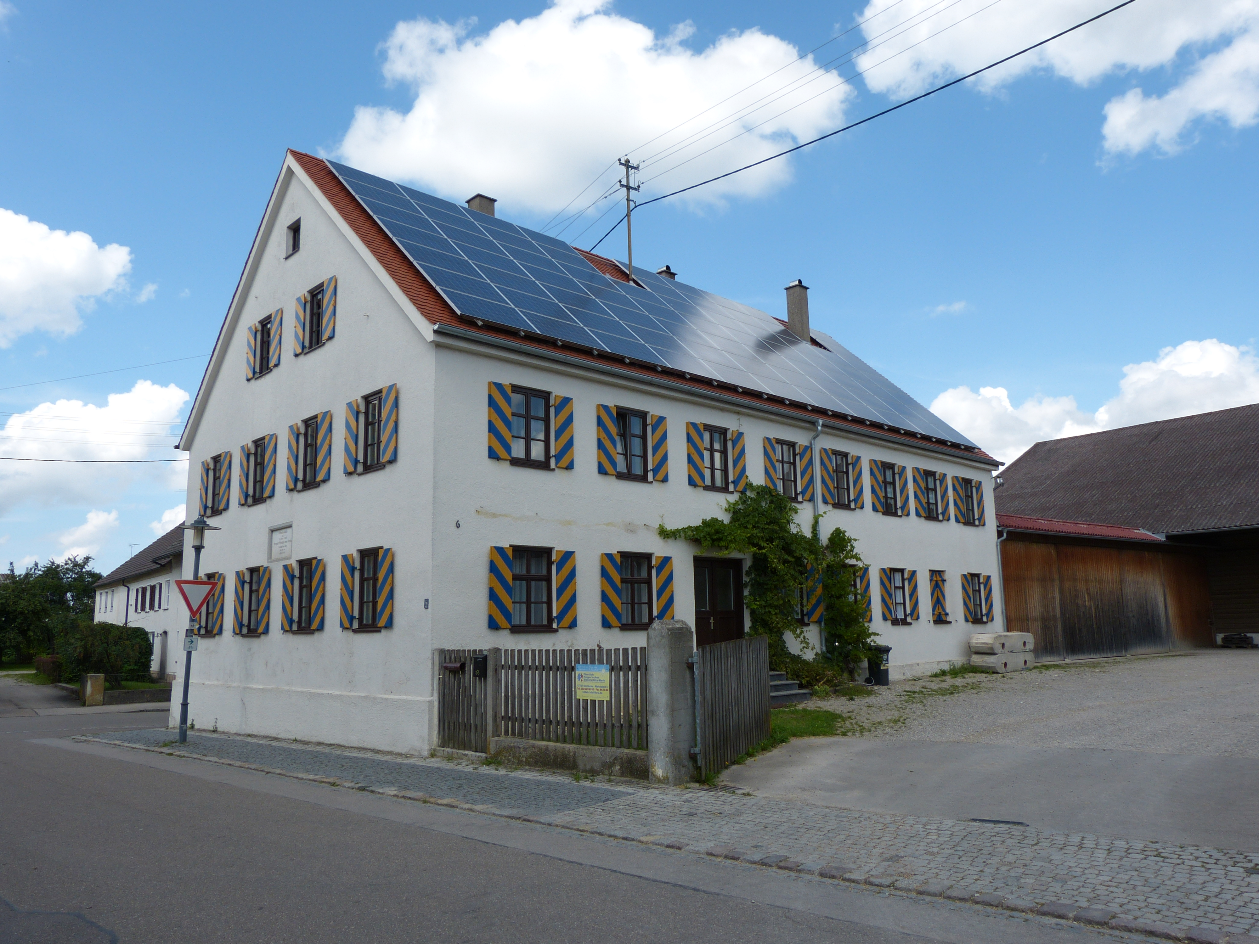 Ehemaliges Amtsgebäude und Wohnhaus, Kirchheim in Schwaben, Landkreis Unterallgäu, Bayern